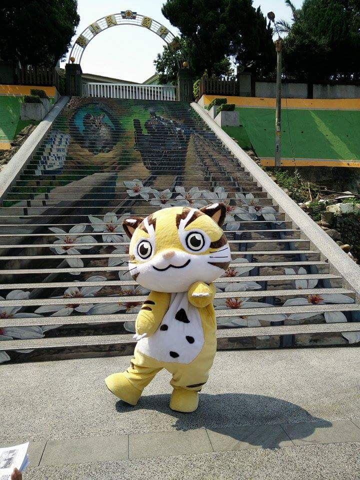 建中国小3D彩绘楼梯由魏荣欣与萧章共同合作在2016-01-01完成，绘制包含石虎、胜兴车站、龙腾断桥、木雕达摩 。完成后造成3D彩绘视觉震撼，经「电视新闻」与「网路分享」传播后，此地点已变成三义乡必访景点。